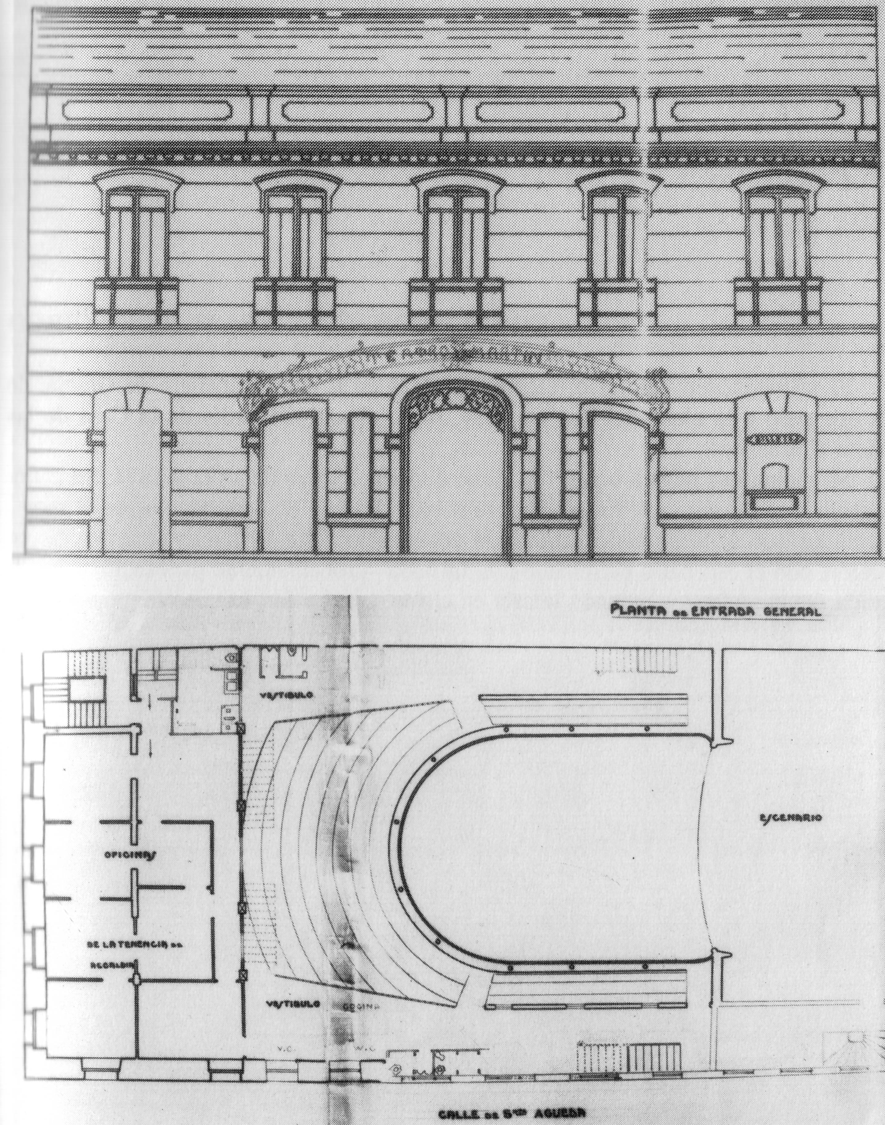 Proyecto de reforma del Teatro Martín de Madrid en 1919. Museo Municipal de Madrid.